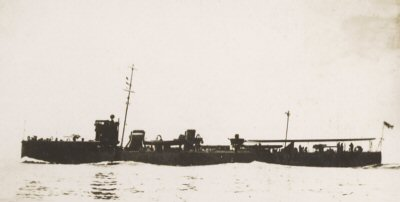 HMS Forester